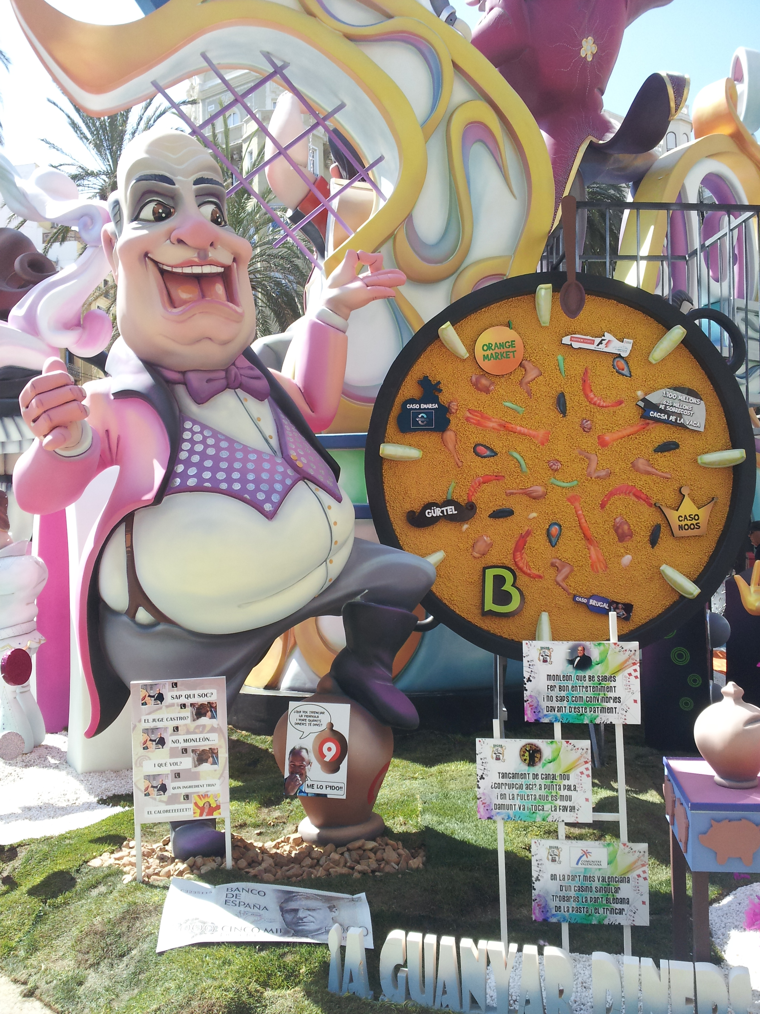 Escenes de la falla